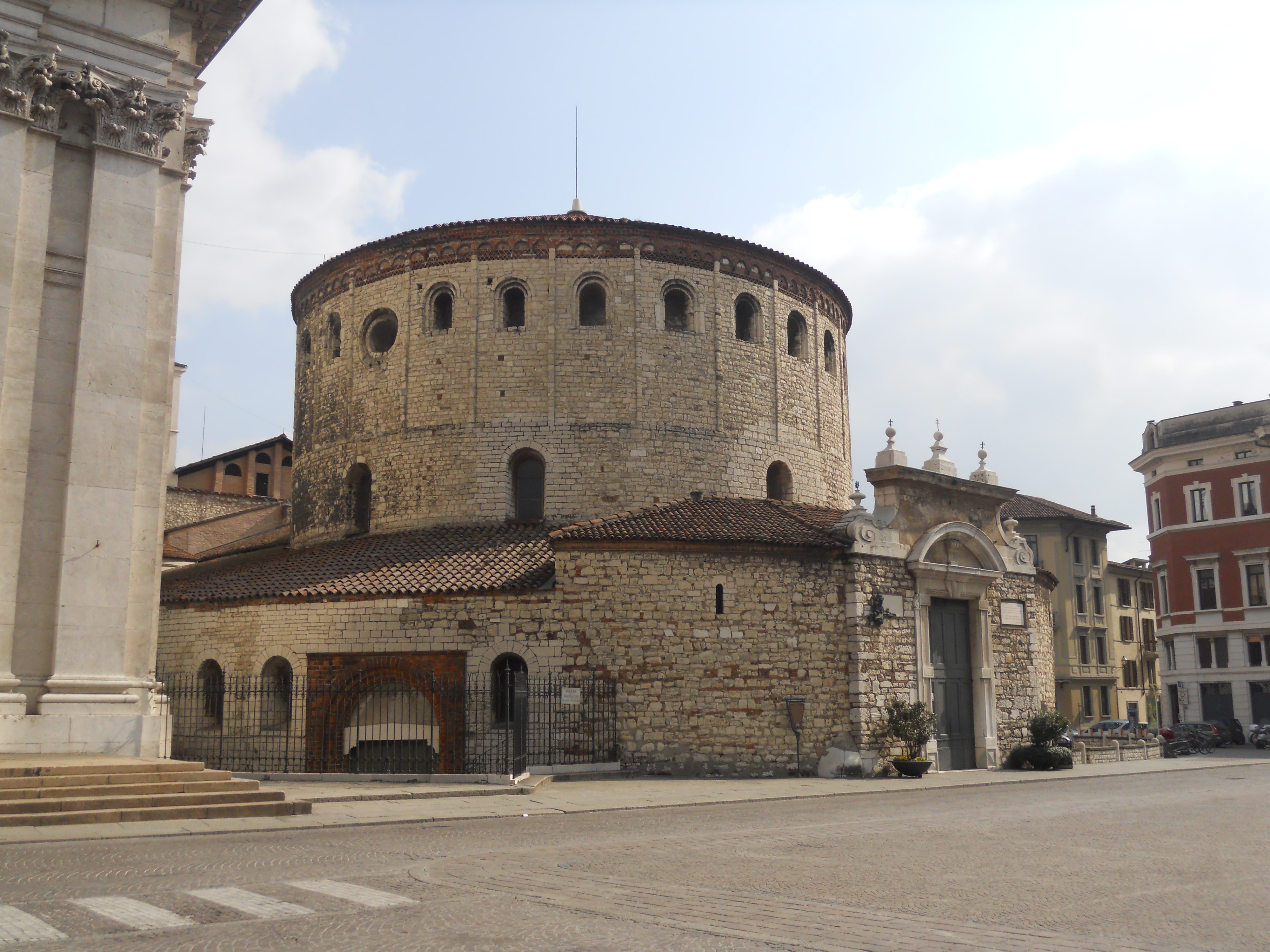 duomo vecchio (brescia) esterno